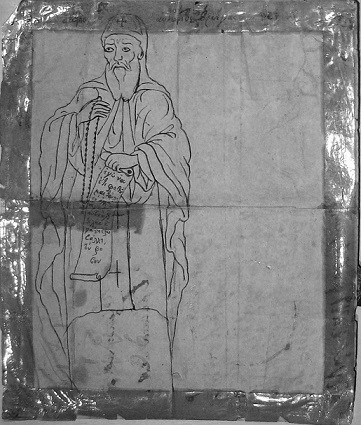 Работна скица на Адамче Зограф